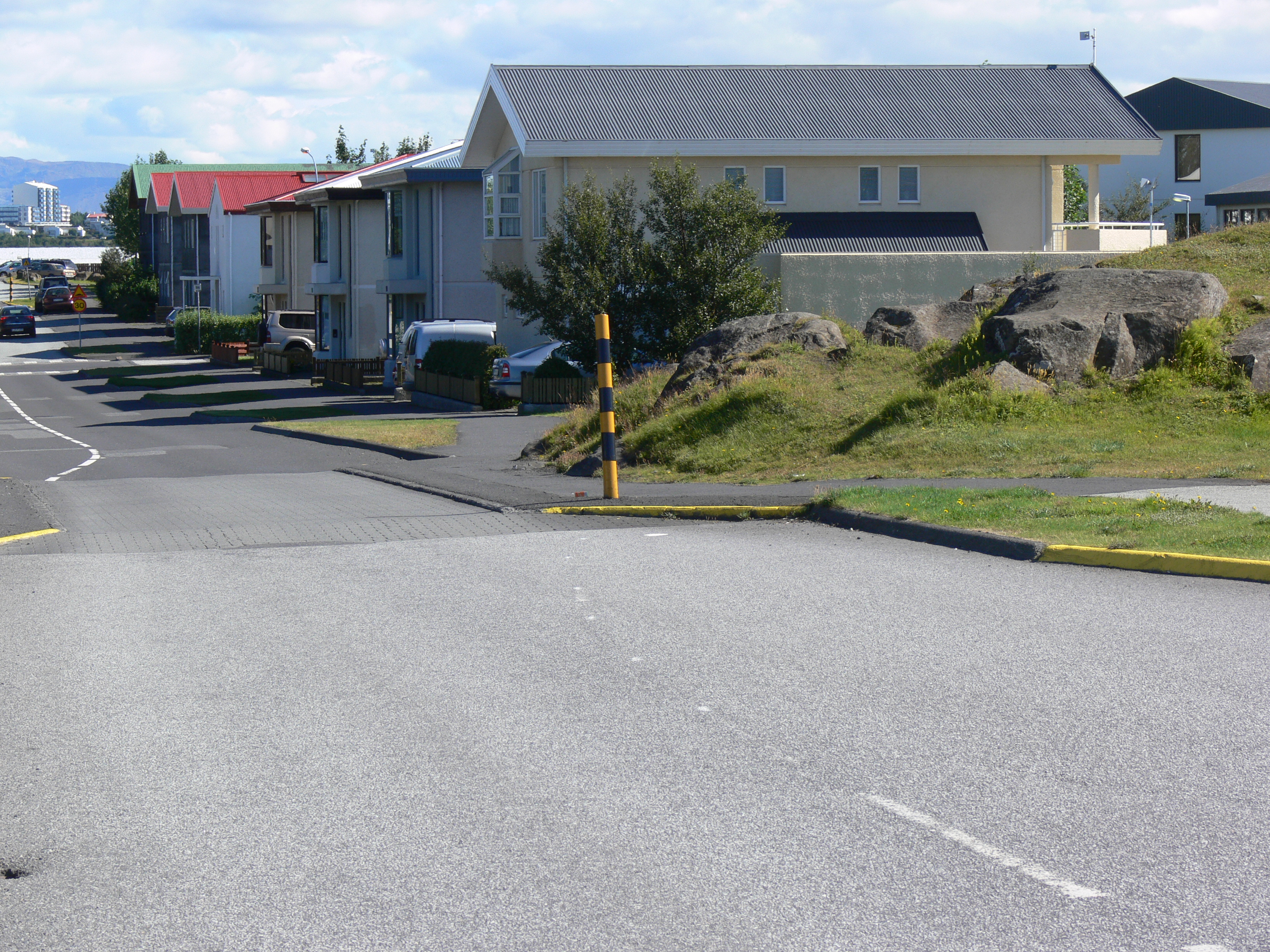 Álfastein in Kópavogur bei Álfholsvegur 125. Hier sollen Elfen wohnen, weshalb die Straße hier verengt wird.